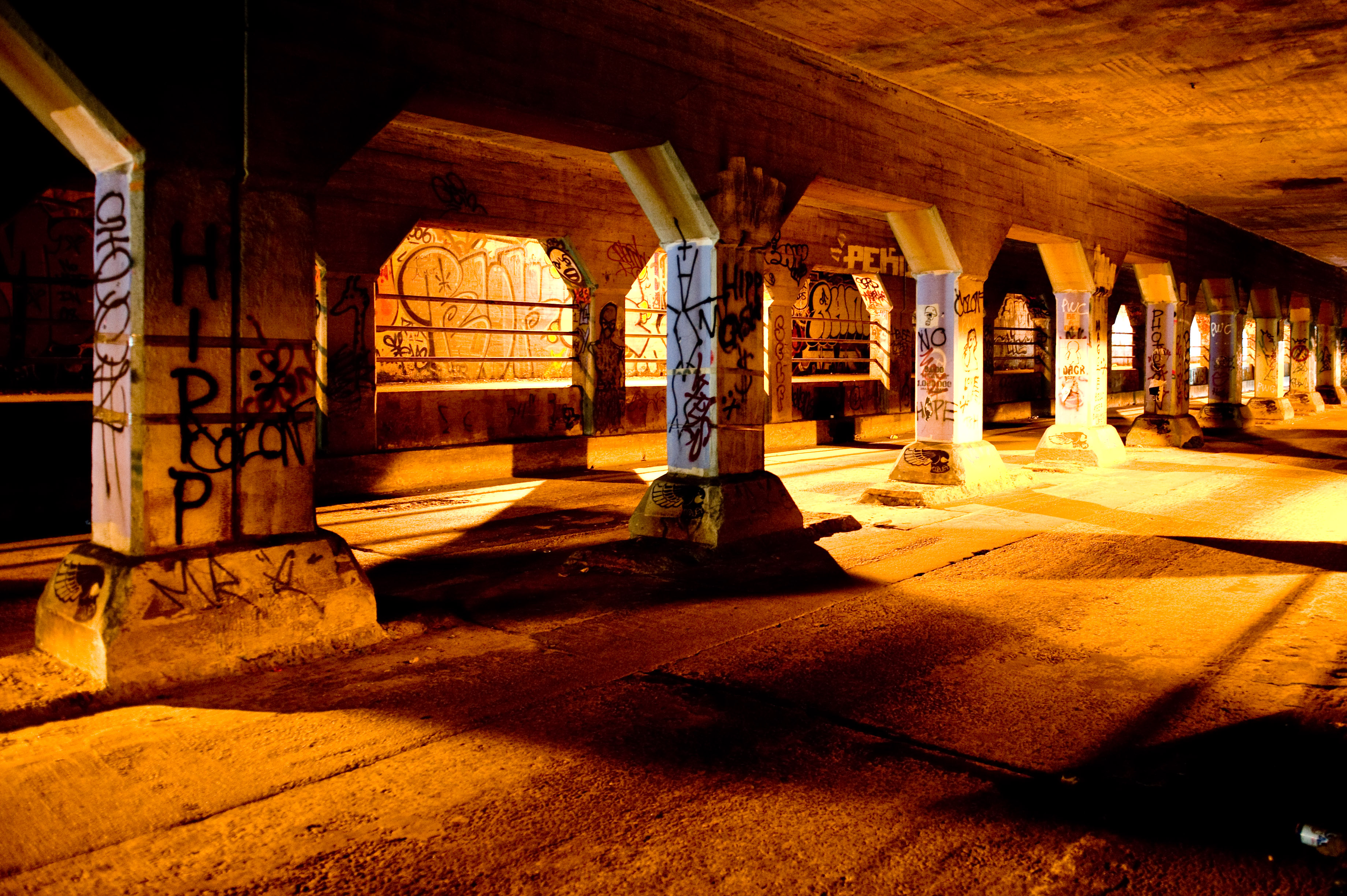 Krog Street Tunnel - Atlanta, GA